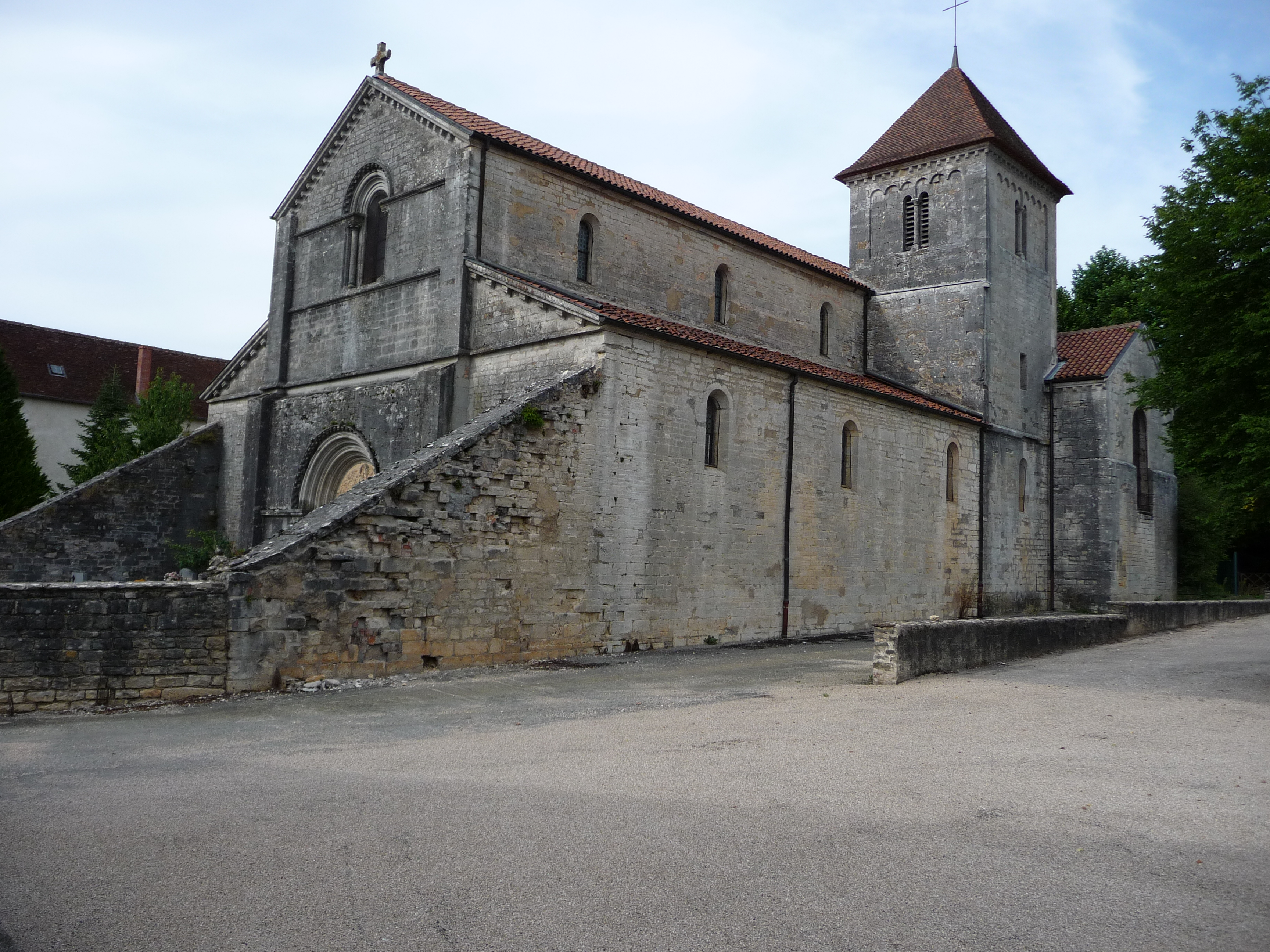 L'église de Courtefontaine dans le Jura (Douzième siècle)